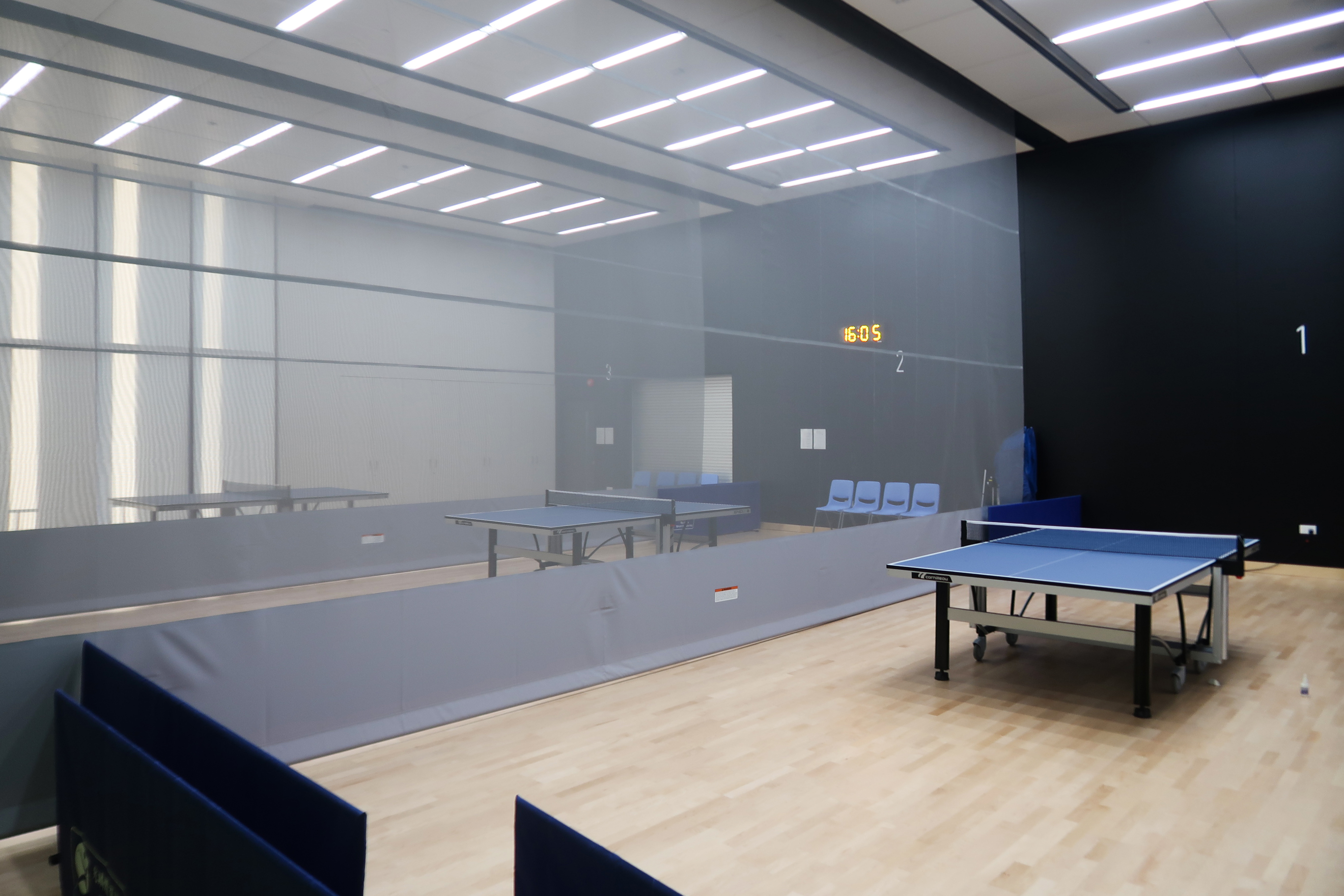 Siu Lun Sports Centre Table tennis room